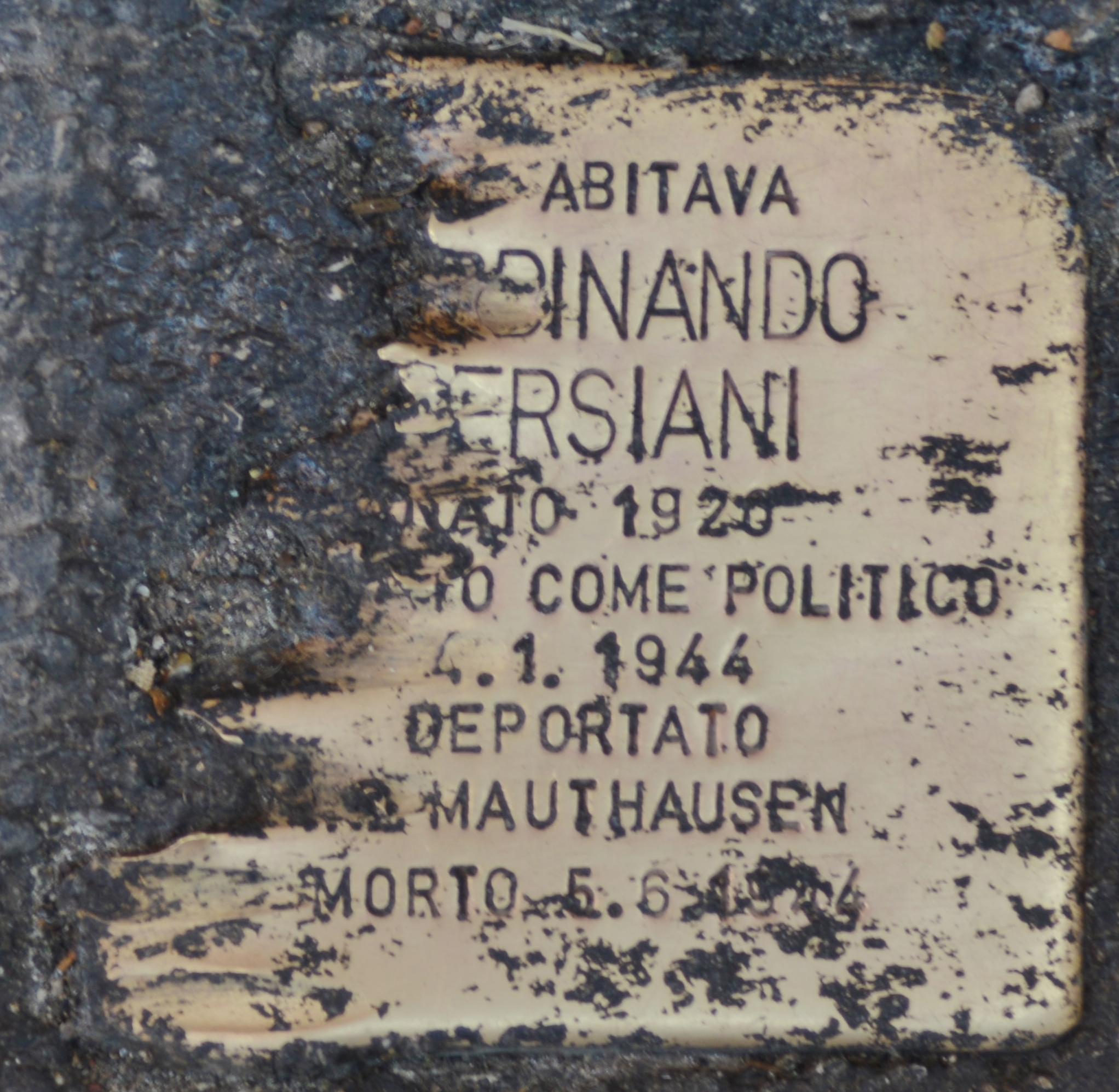 Stolperstein für Ferdinando Persiani